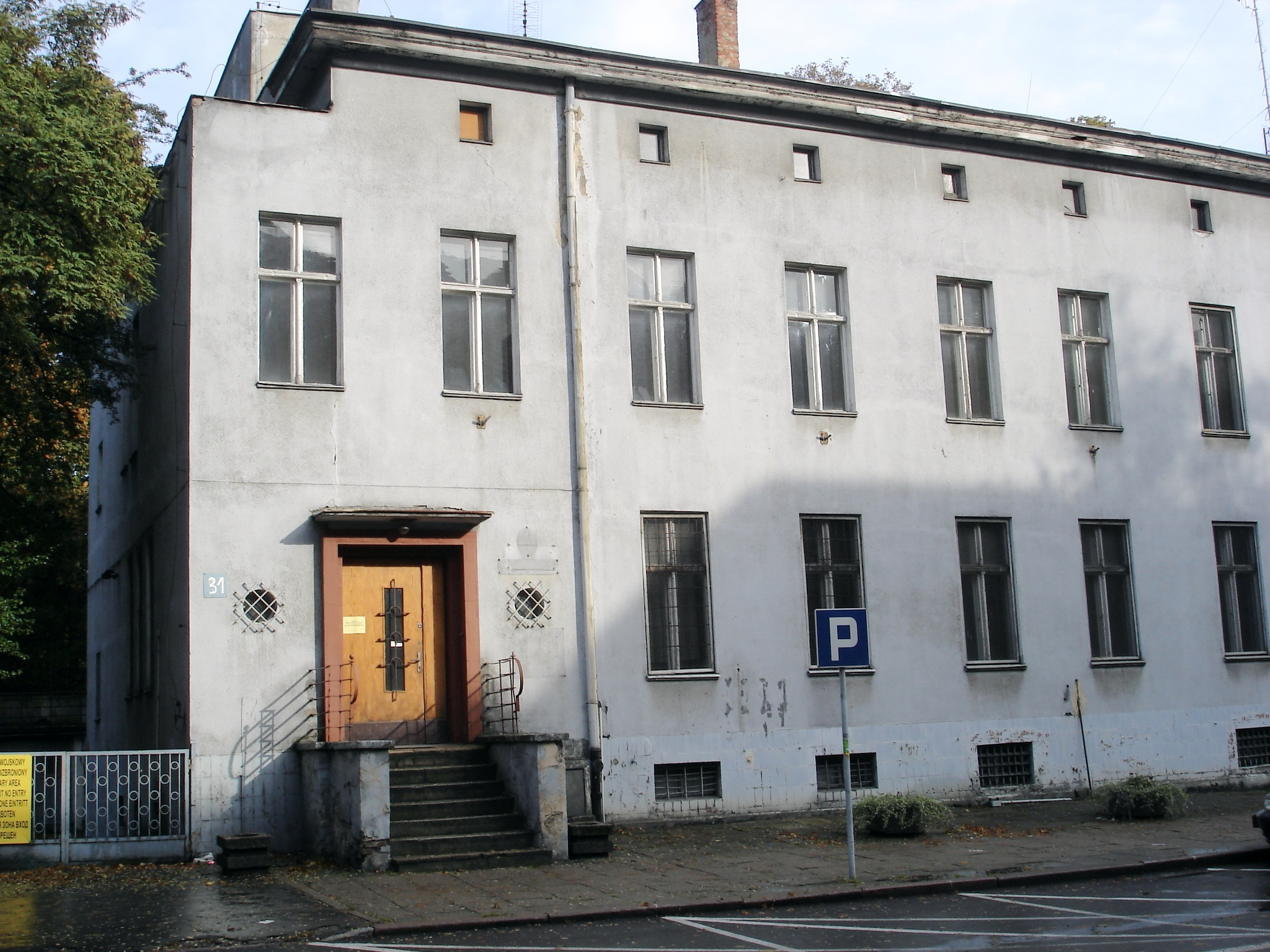 WKU w Stargardzie Szczecińskim